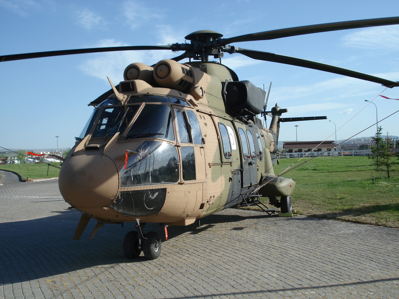 IDEF '07 Savunma Fuarı'nda çekildi.AS-532 Cougar.23 Mayıs 2007